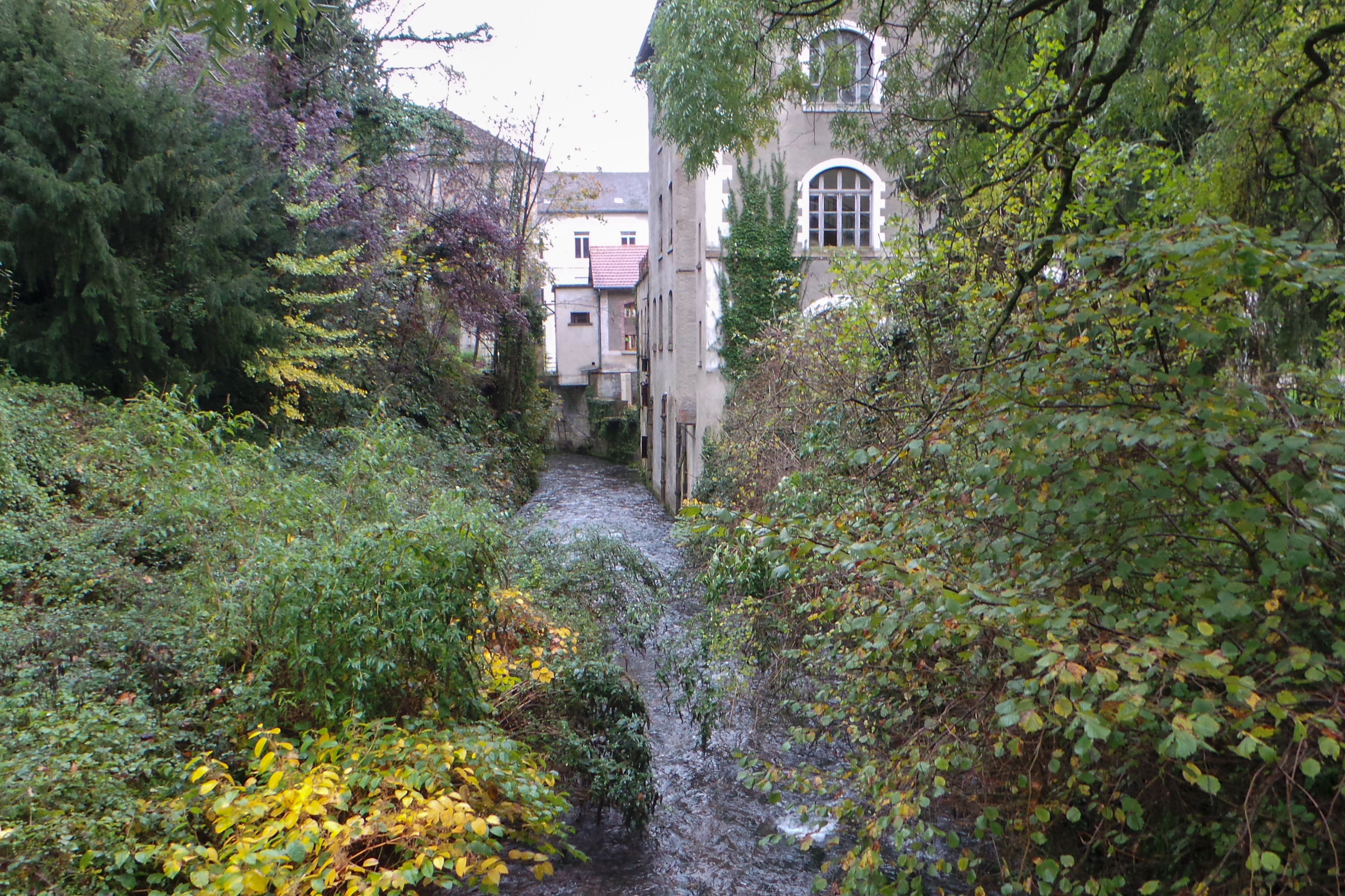 La Grande Fabrique, renage (Isère/France)